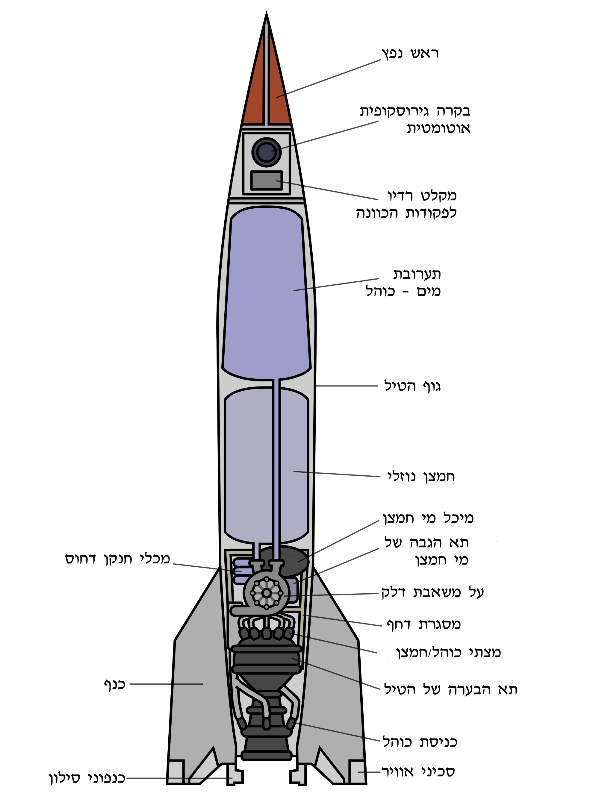 מבנה טיל ה-V-2, והסבריו